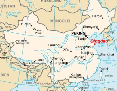 Lage der Stadt Qingdao. Format ist verkleinert und ein Punkt hinzugefügt. CIA World Factbook